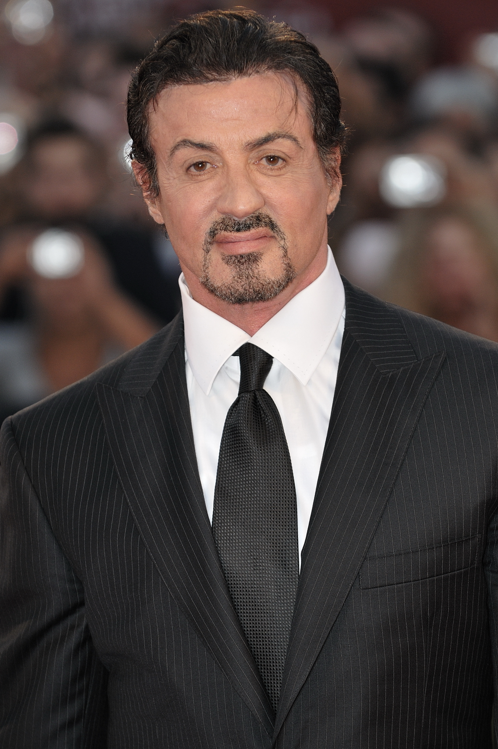 66ème Festival du Cinéma de Venise (Mostra), 11ème jour (12/09/2009) Tapis rouge pour la soirée de cloture du Festival de Venise 2009 Sylvester Stallone